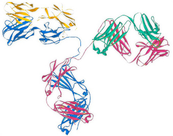 Abagovomab (monoclonal antibody)